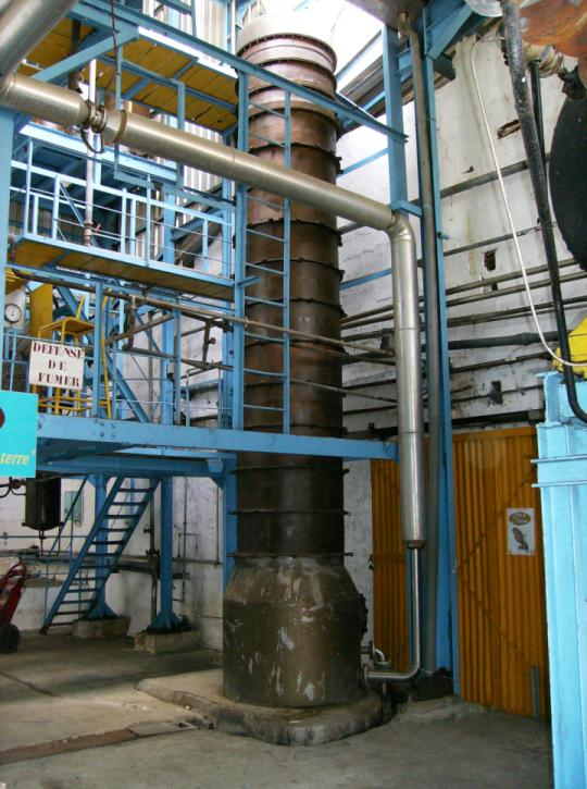 Colonne à distiller de l'usine 3 Rivières, Martinique